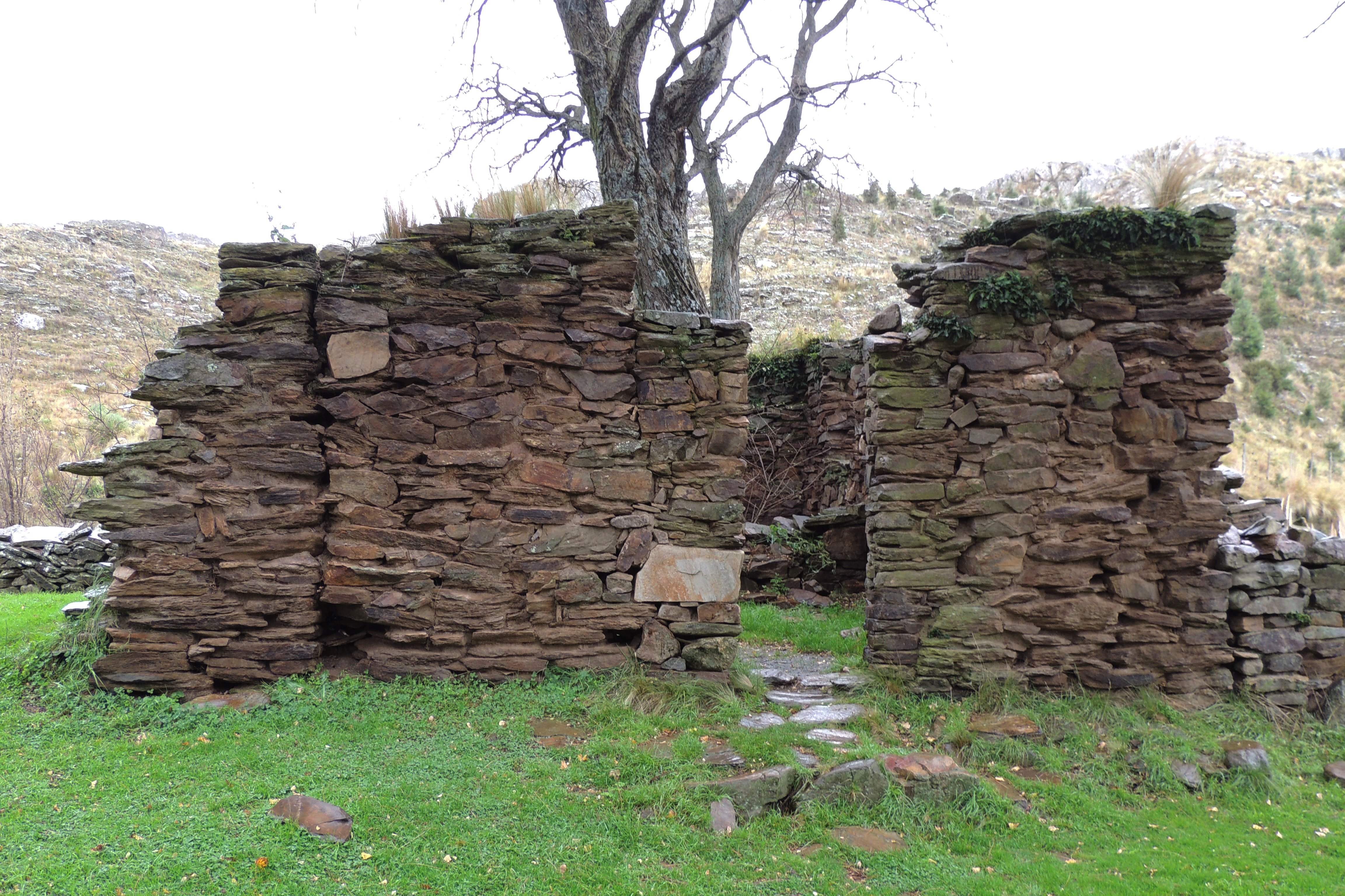 La Carolina, San Luis, Argentina